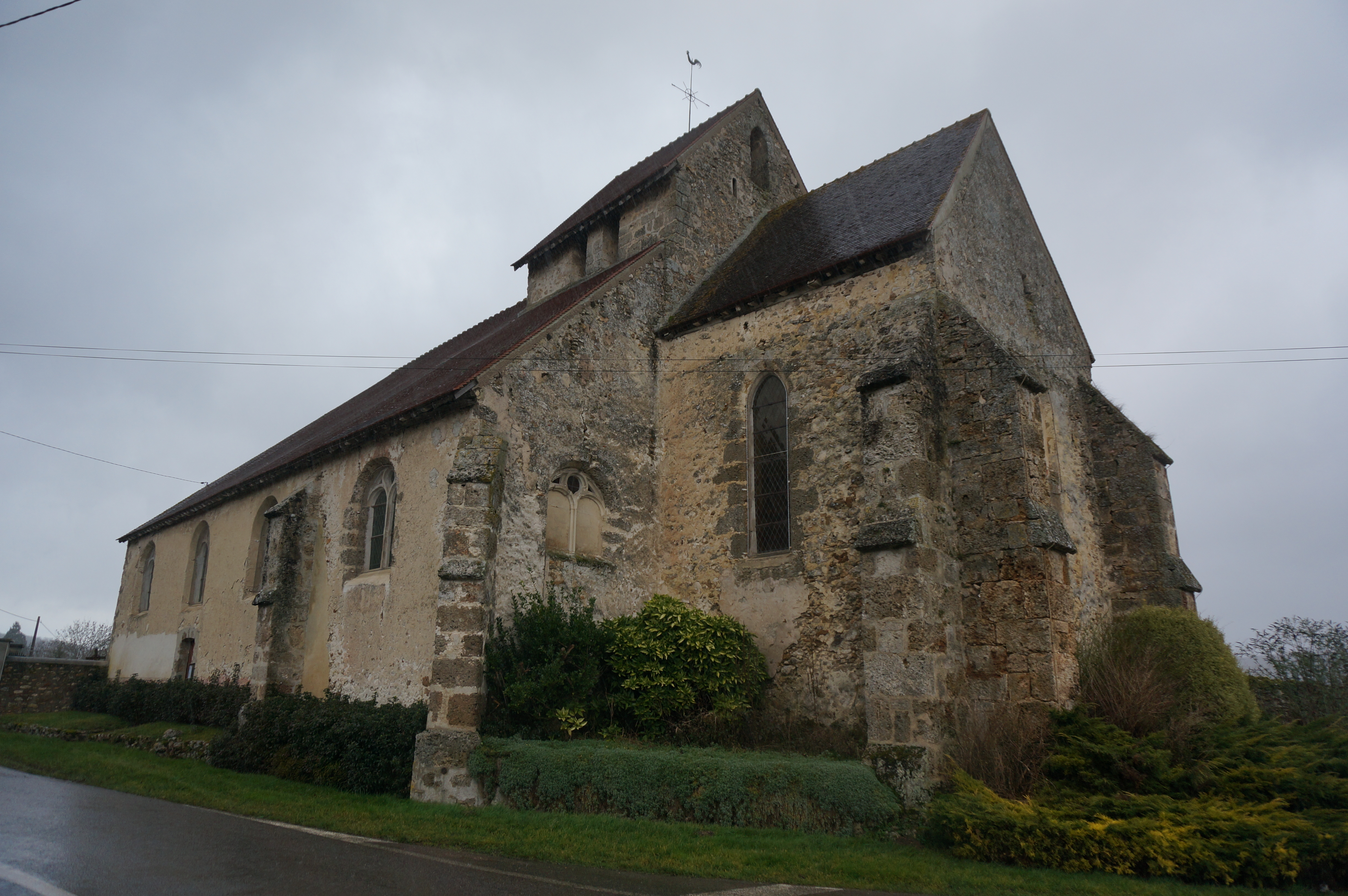 église à la Ville sous Orbais.